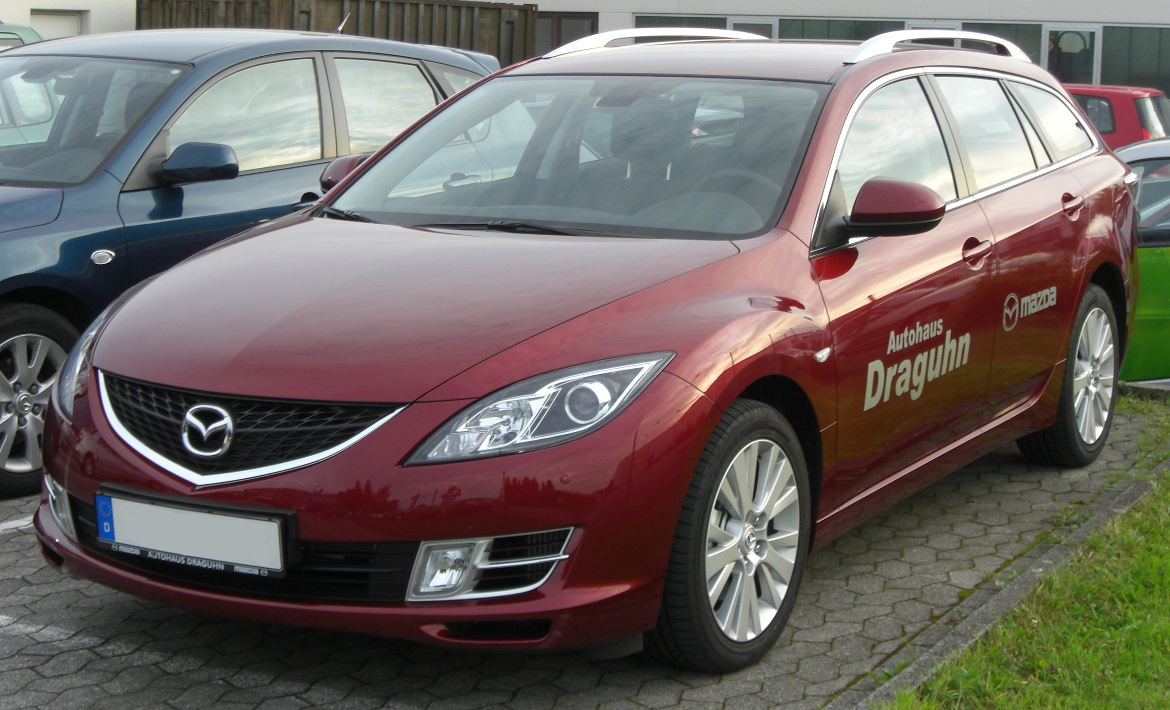 Mazda 6 Sport Kombi